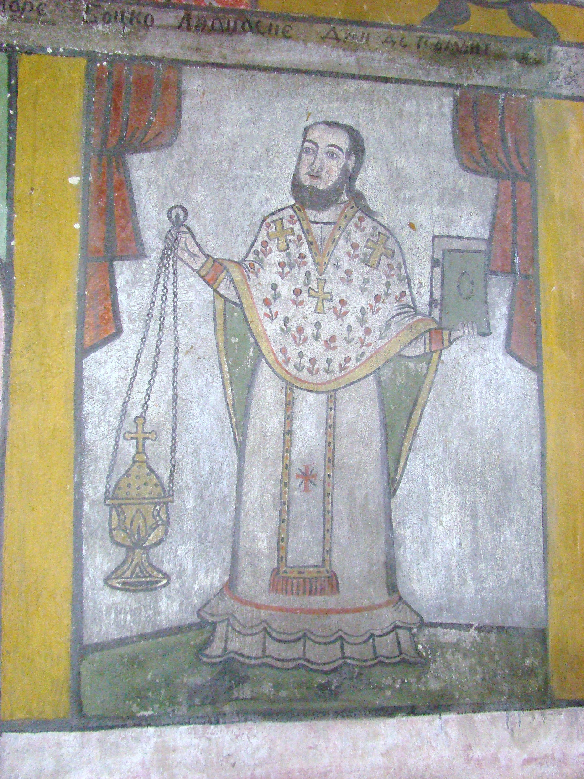 Biserica „Nașterea Maicii Domnului” din Homorog, județul Bihor